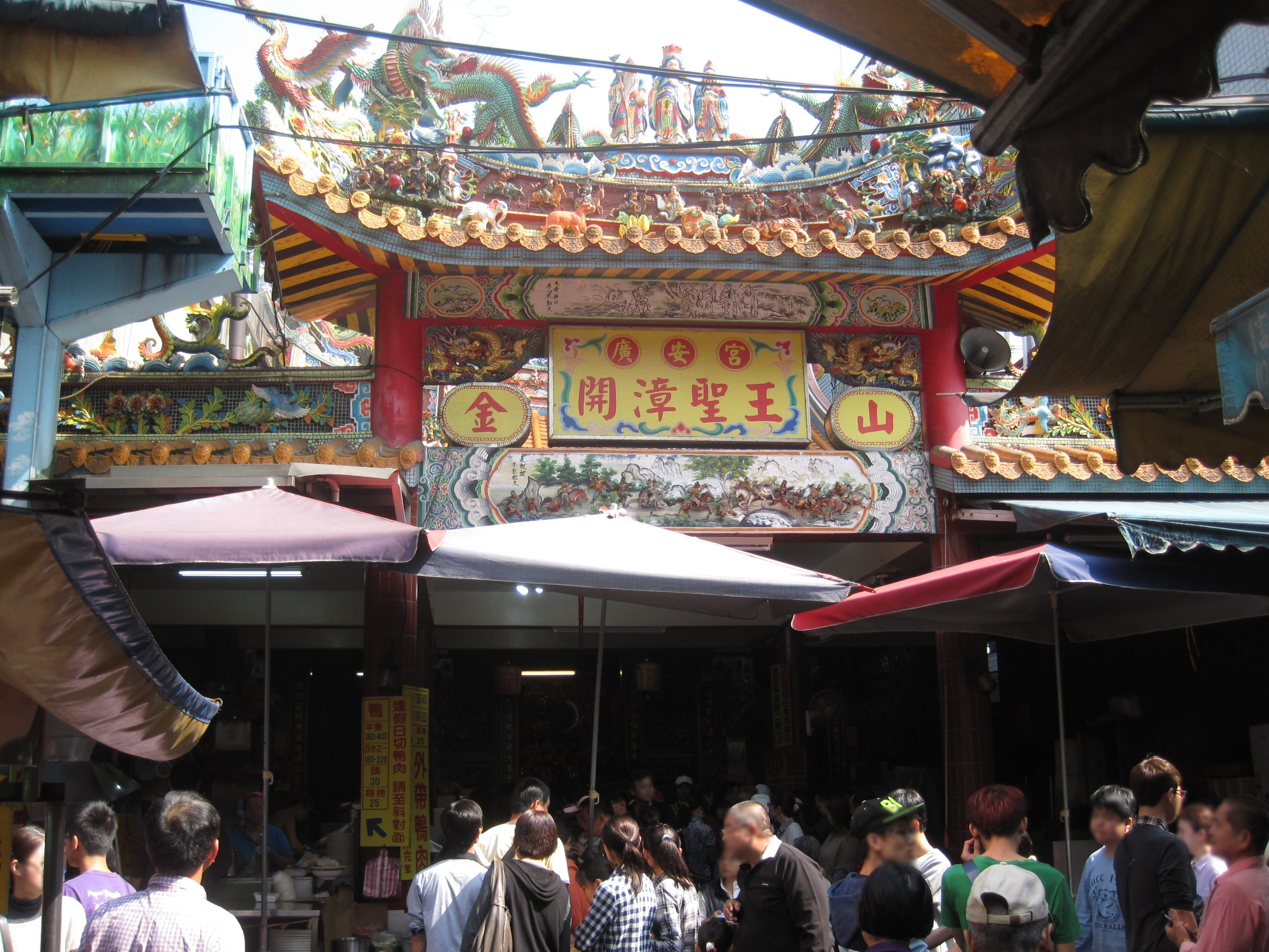 金山廣安宮主祀開漳聖王，位於金包里街的中央